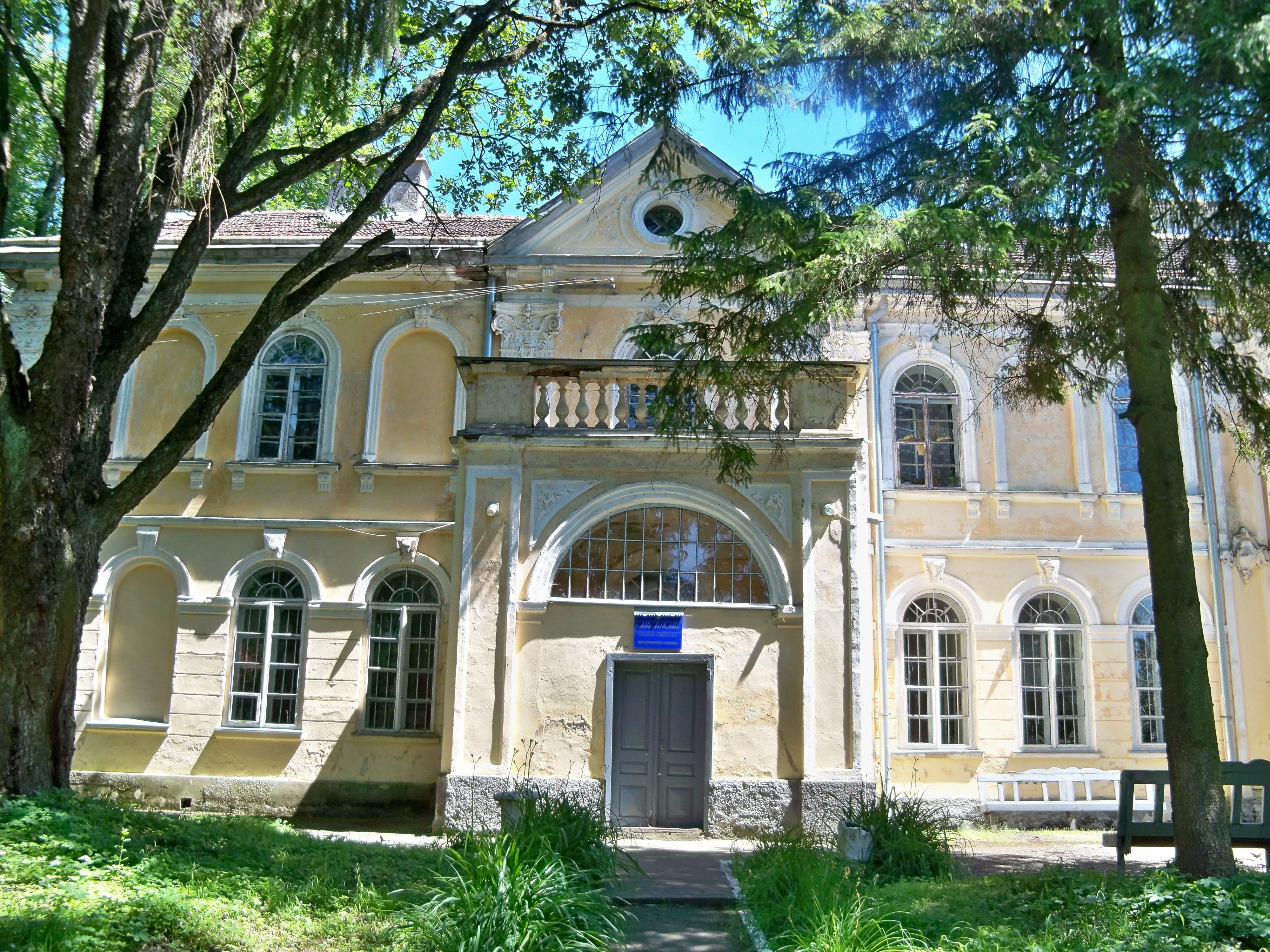 Парк ХVІІІ ст., Городоцький р-н, с. Вишня